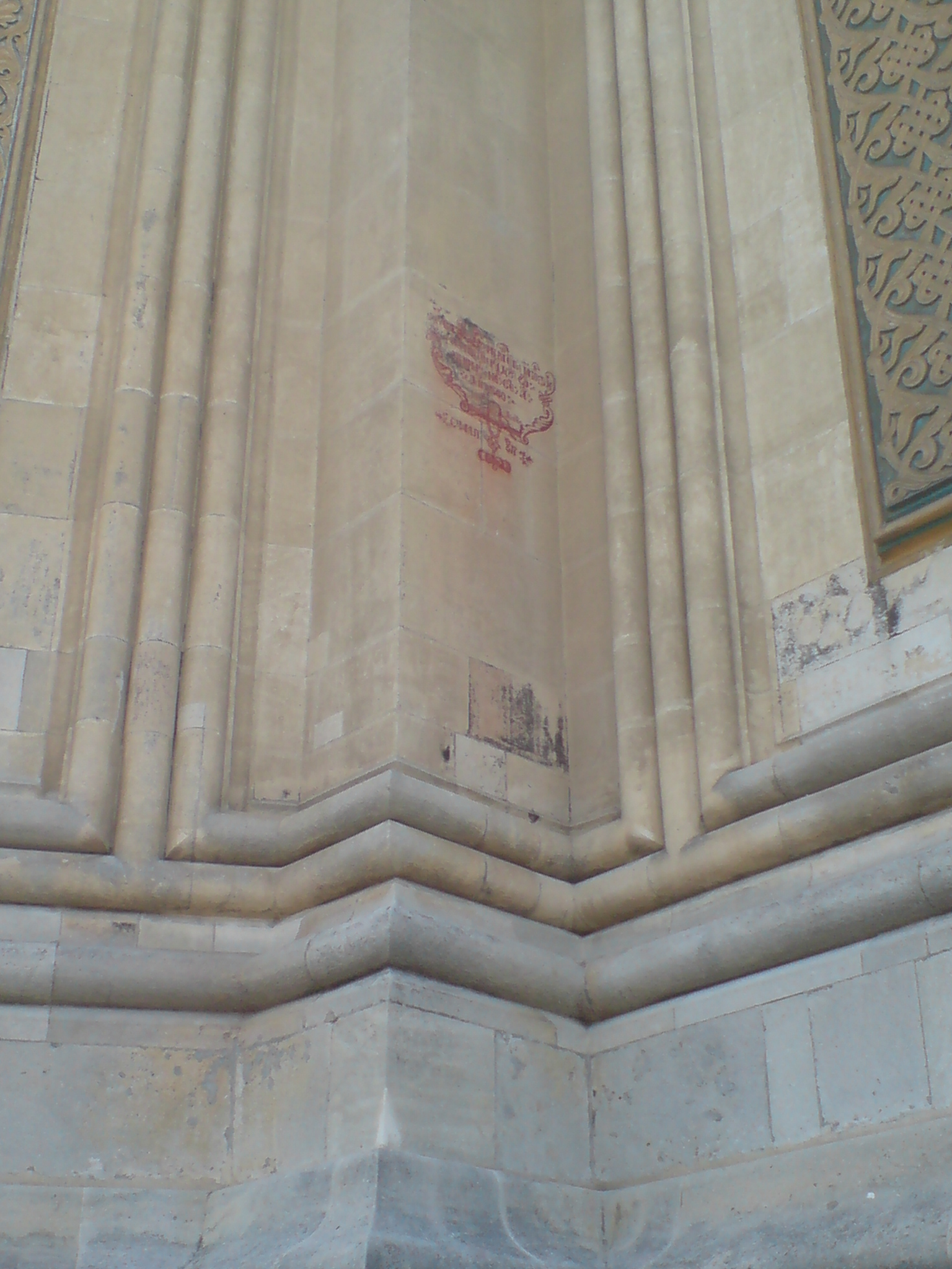 Mormantul Sfintei Ana, Sacrificiul feminin pentru constructia Manastirii Curtea de Arges